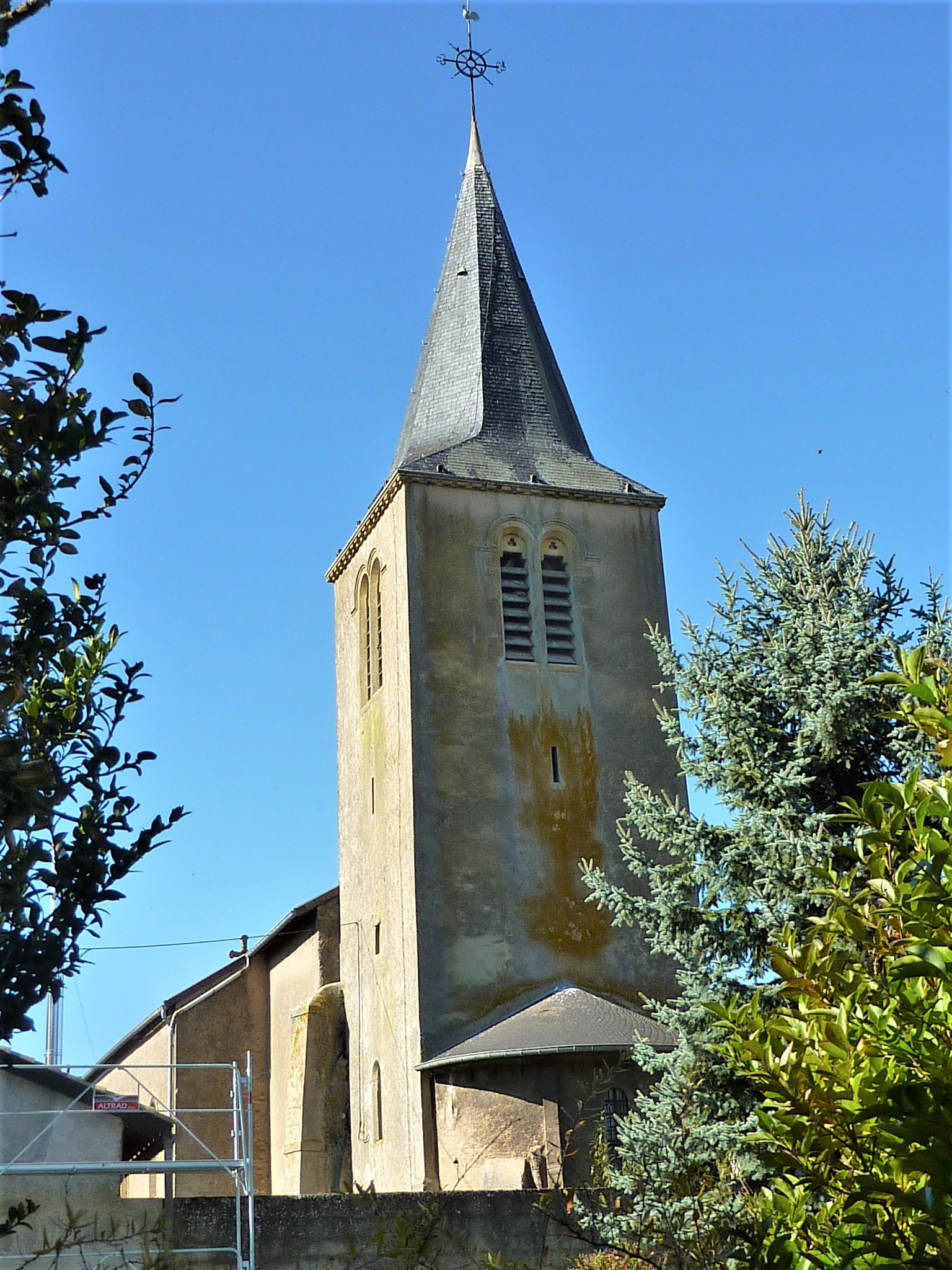 Église Saint-Auteur de Rezonville